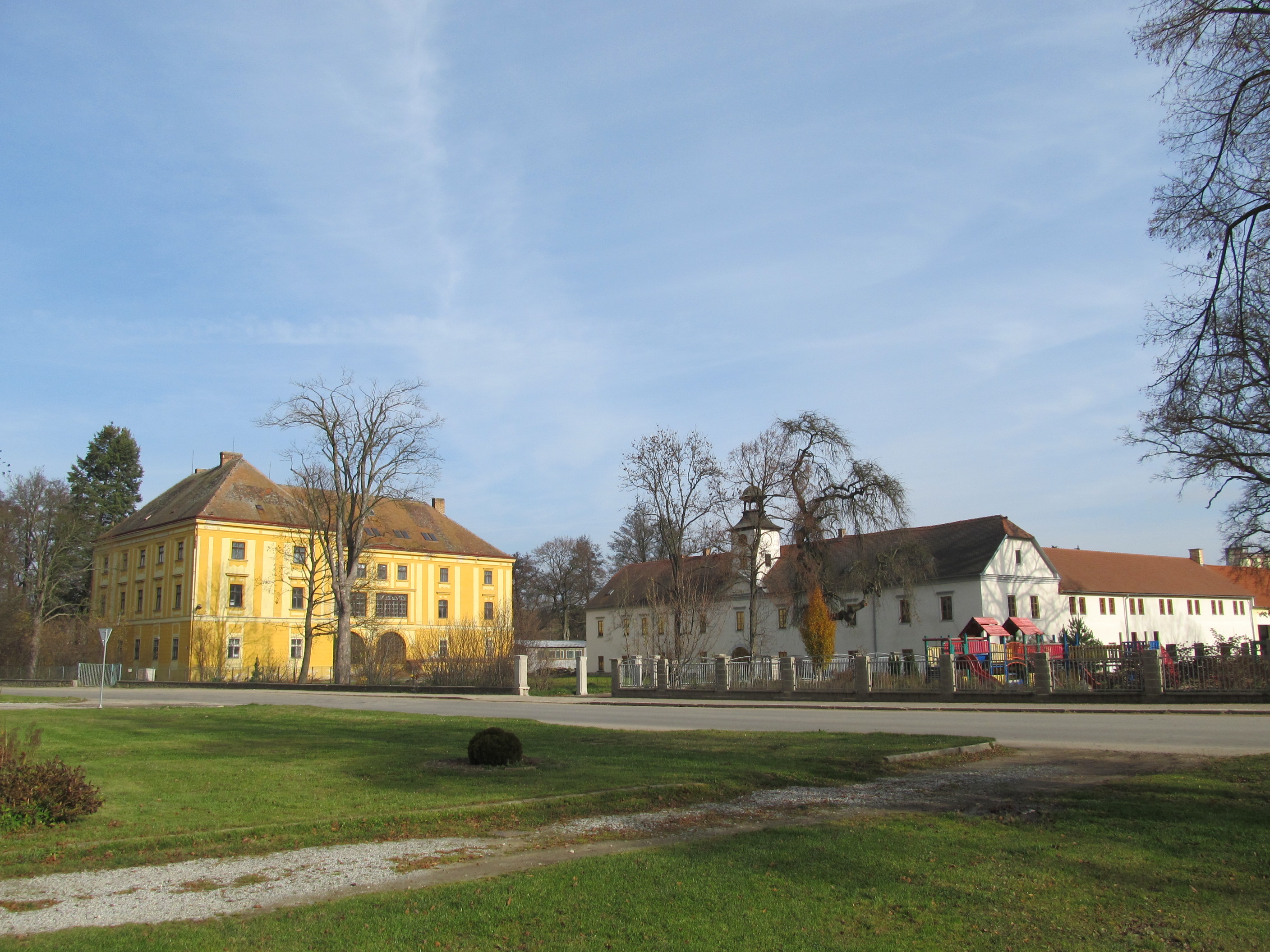 Batelov - Nový a Starý zámek